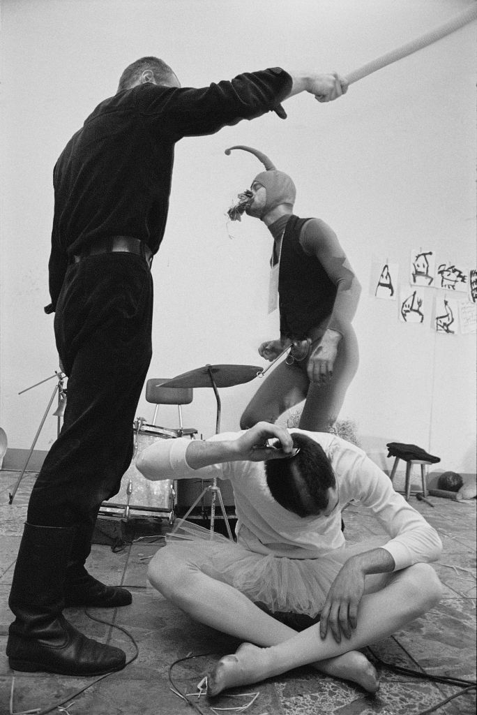 Die Auto-Perforations-Artisten Rainer Görß, Micha Brendel und Via Lewandowsky während der Performance "panem et circensis" an der Hochschule für Bildenden Künste Dresden, Oktober 1988